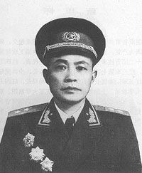 黄新廷中将1955年授衔照